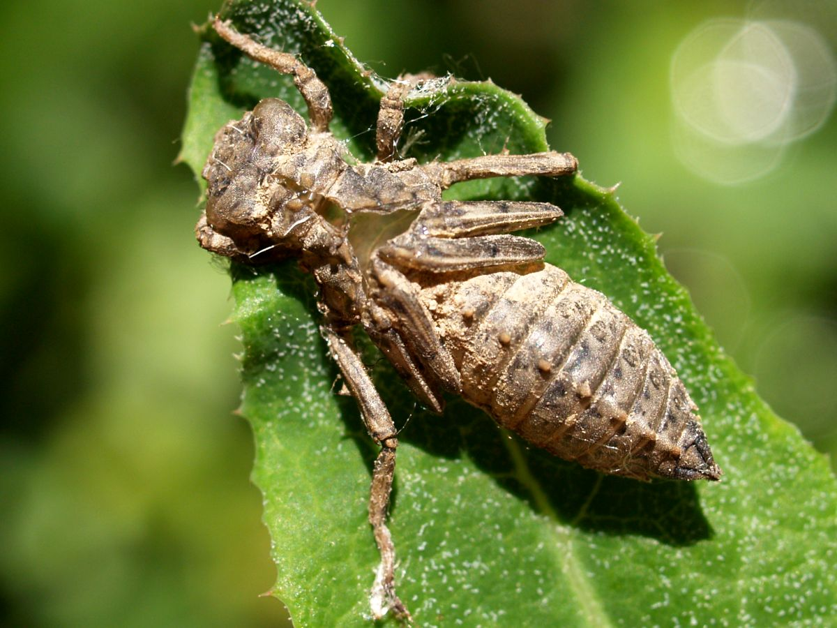 Onychogomphus uncatus exuvia